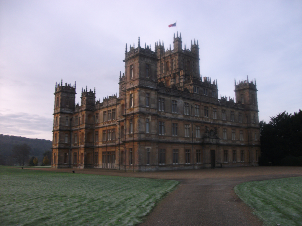 Highclere Castle van de Carnarvon-familie, gelegen op de grens van Berkshire en Hampshire, en decor van Downton Abbey